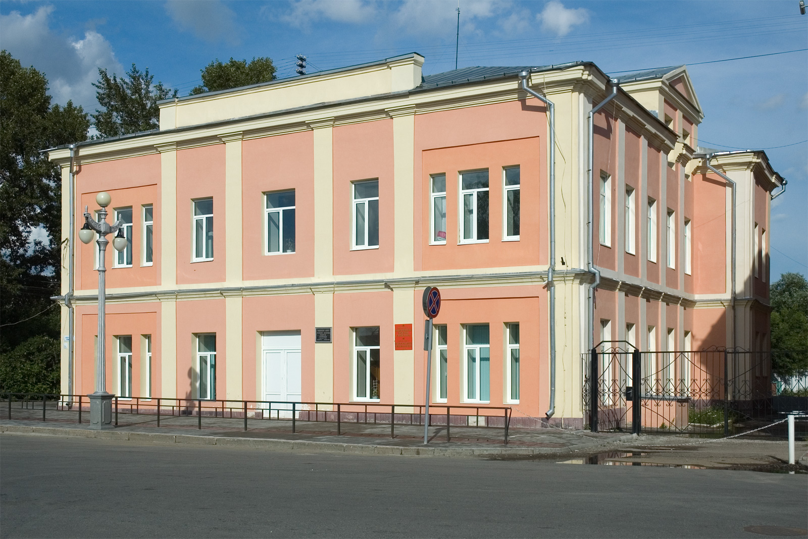 (Томск, Набережная реки Ушайки, д. 4)